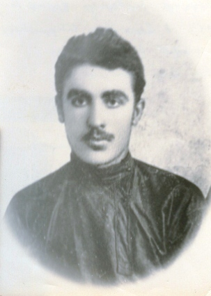 Վիրաբ Ազարյան